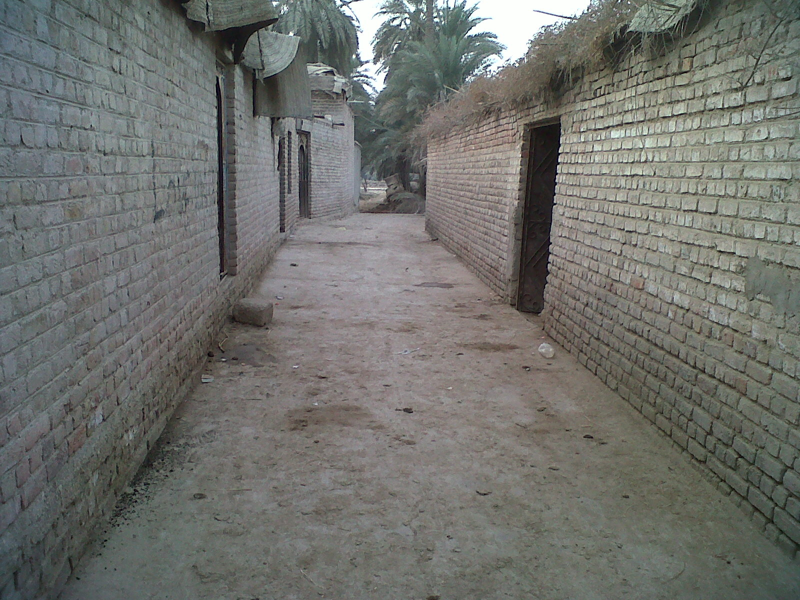 Kingri, Pakistan